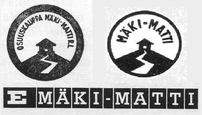 Osuuskaupan käyttämät logot vuosilta 1950 ja 1967